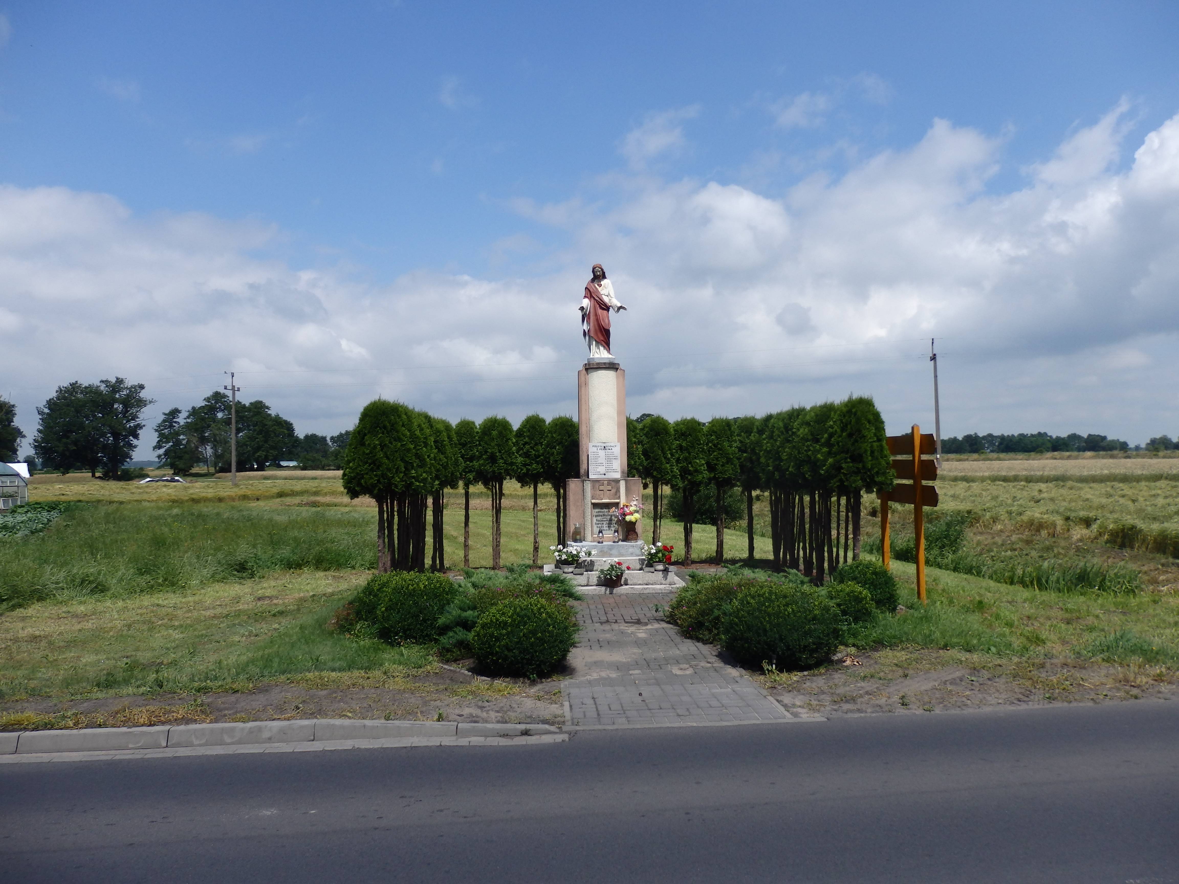 Perkowo